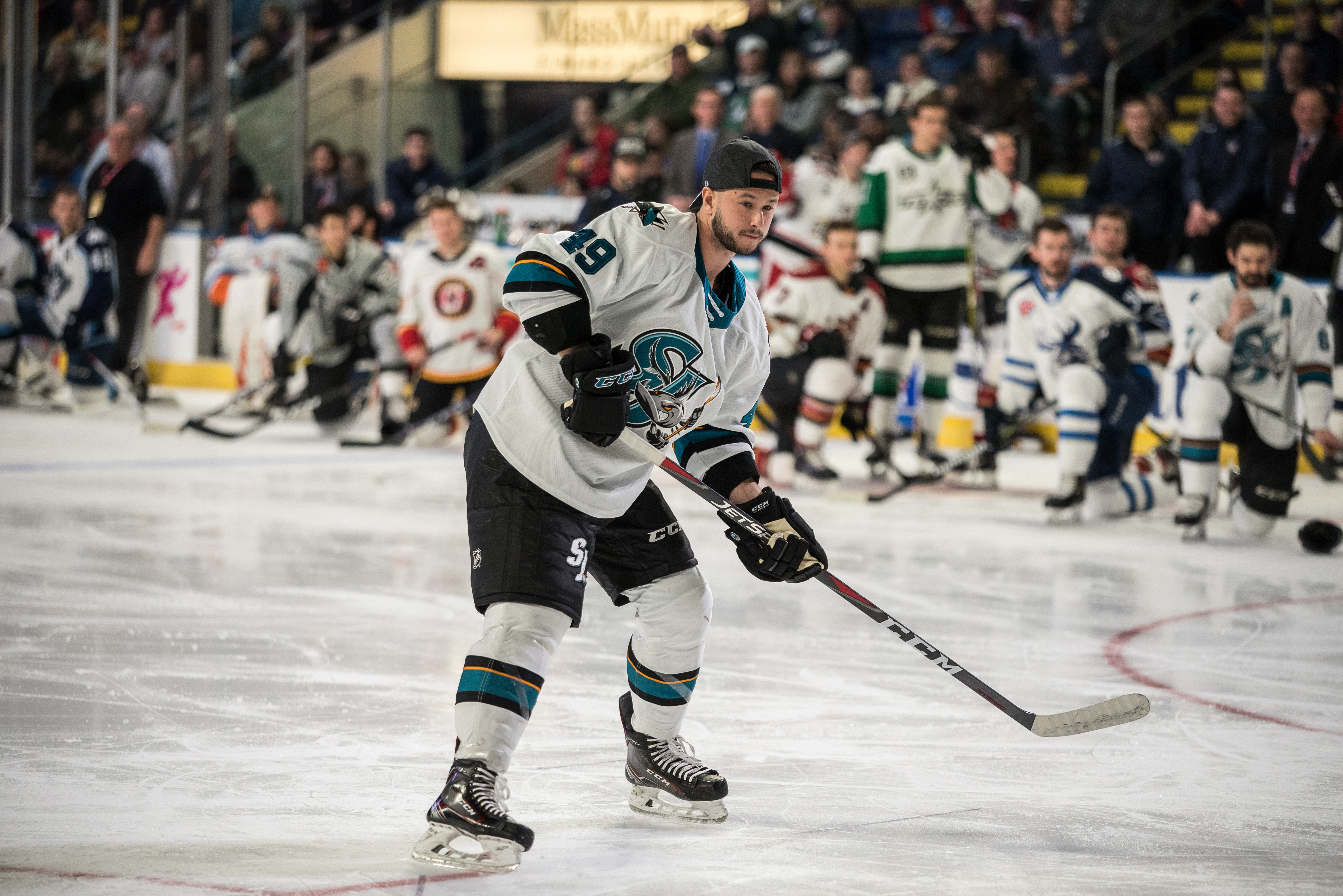 CYW_1767